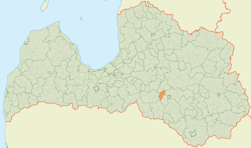 Sēlpils pagasts